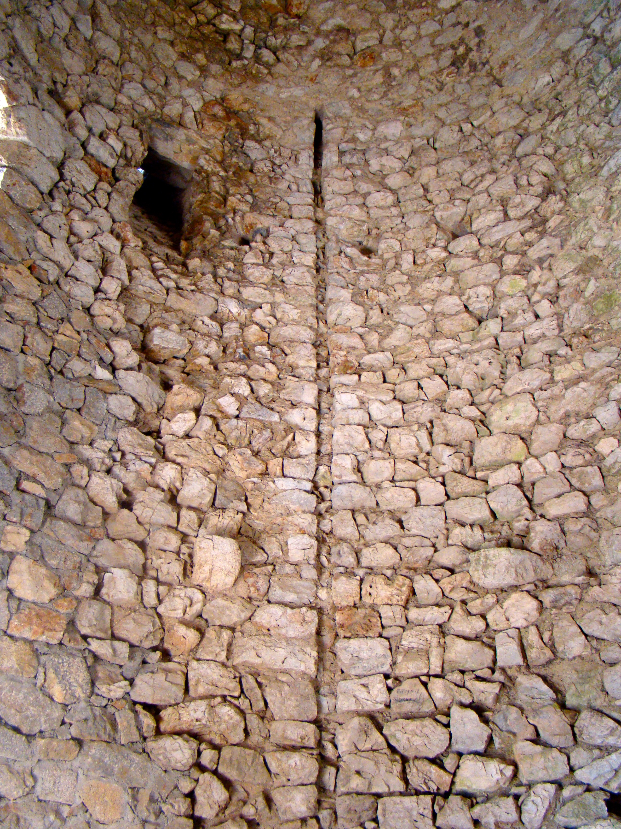 Tour del Far